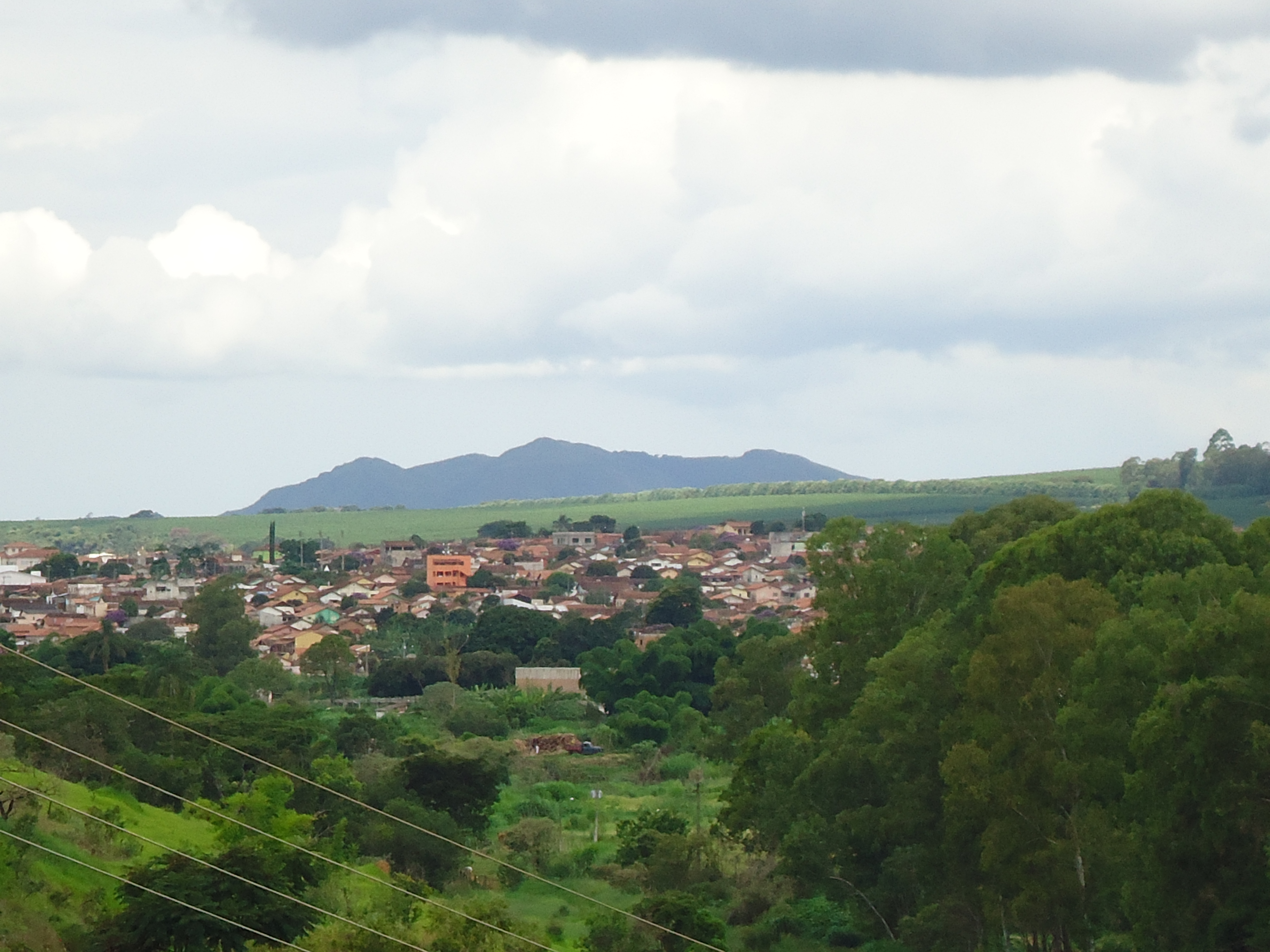 Foto que mostra o formato peculiar da serra